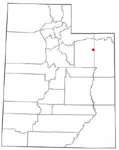 Localización de Neola